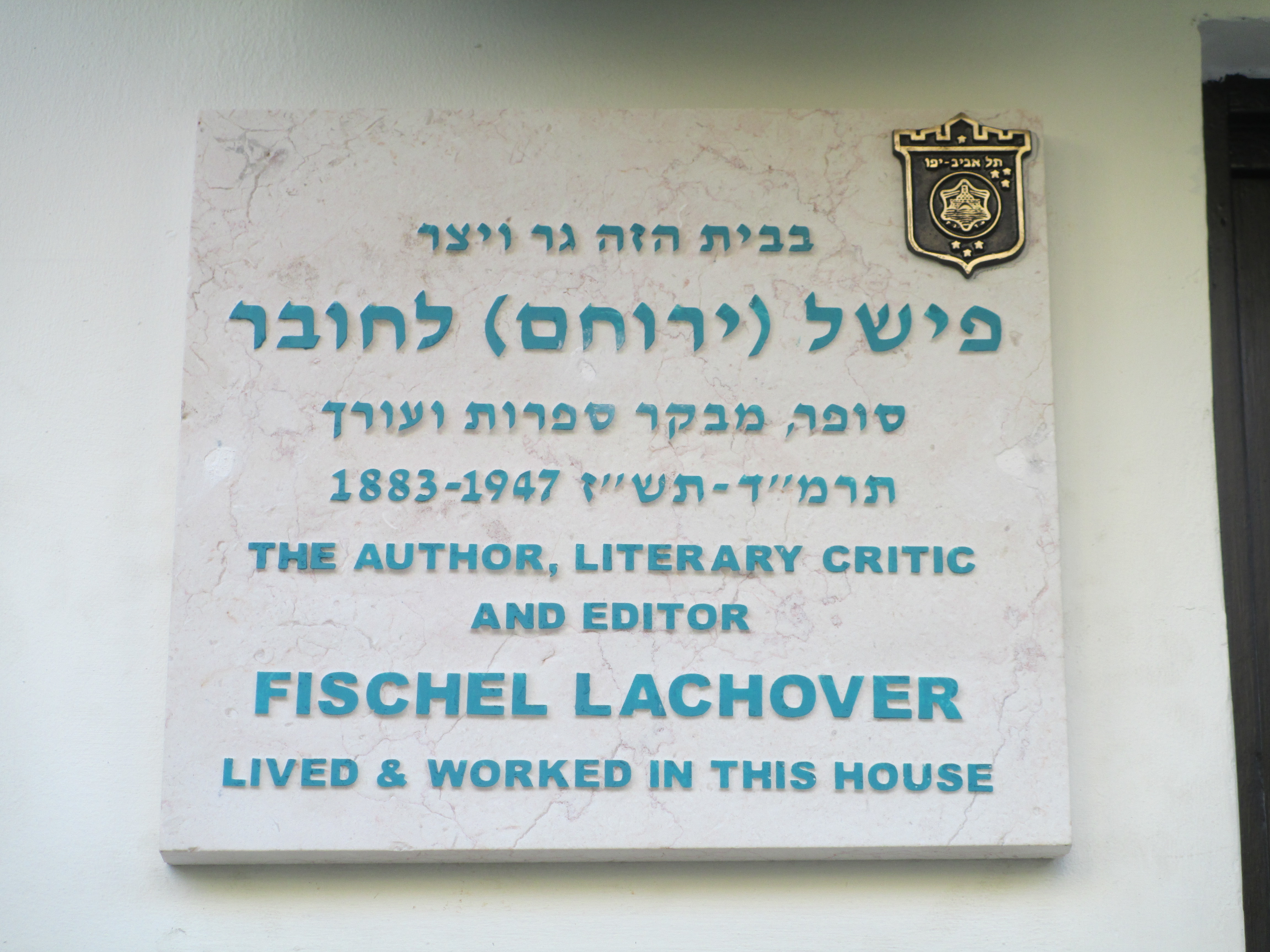 לוחית זיכרון לפישל לחובר ברח' אנגל 7 בתל אביב